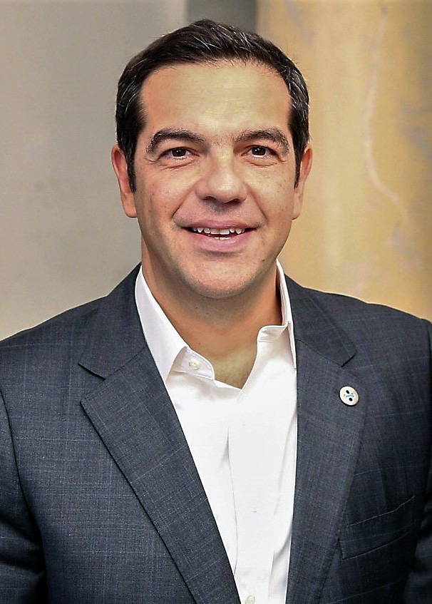 Alexis Tsipras, primer ministro de Grecia.